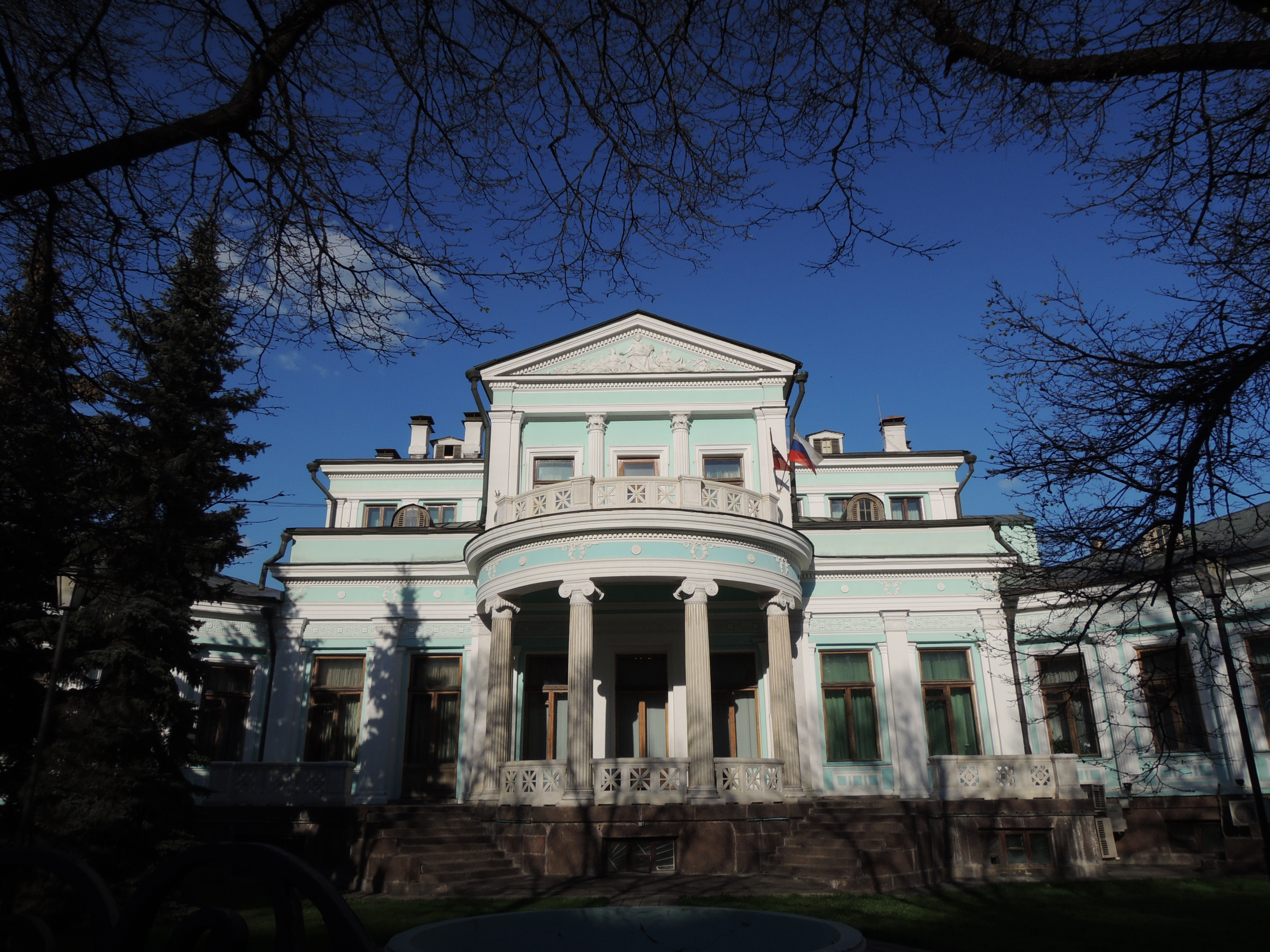 Смоленский бульвар № 26/9 — Особняк К. С. Попова (М. К. Морозовой) (1869; 1876 — полная перестройка и расширение по проекту архитектора А. И. Резанова; 1893—1894 — перестройка архитектором В. А. Мазыриным)